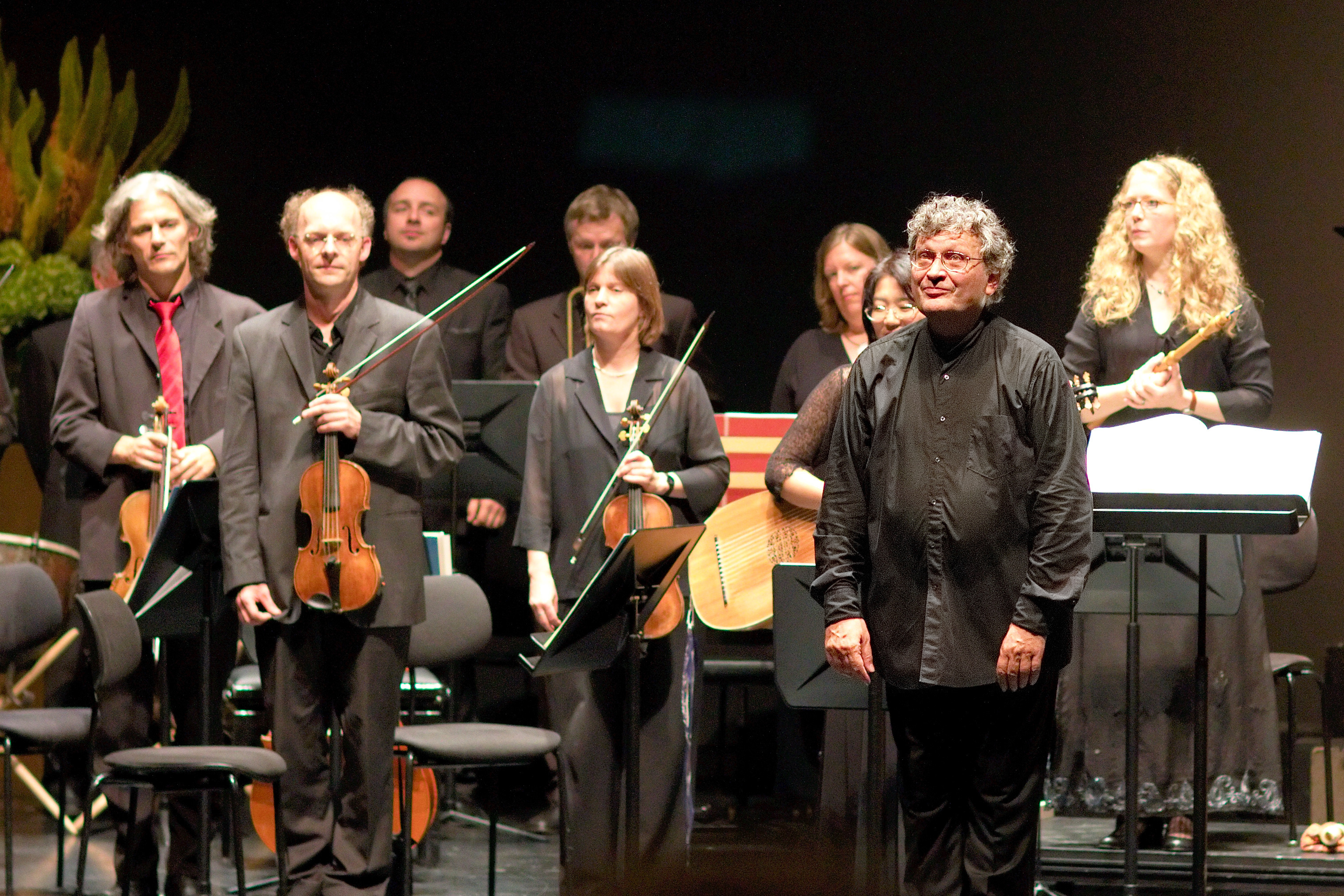 Rene Jacobs bei den Salzburger Pfingstfestspielen 2011